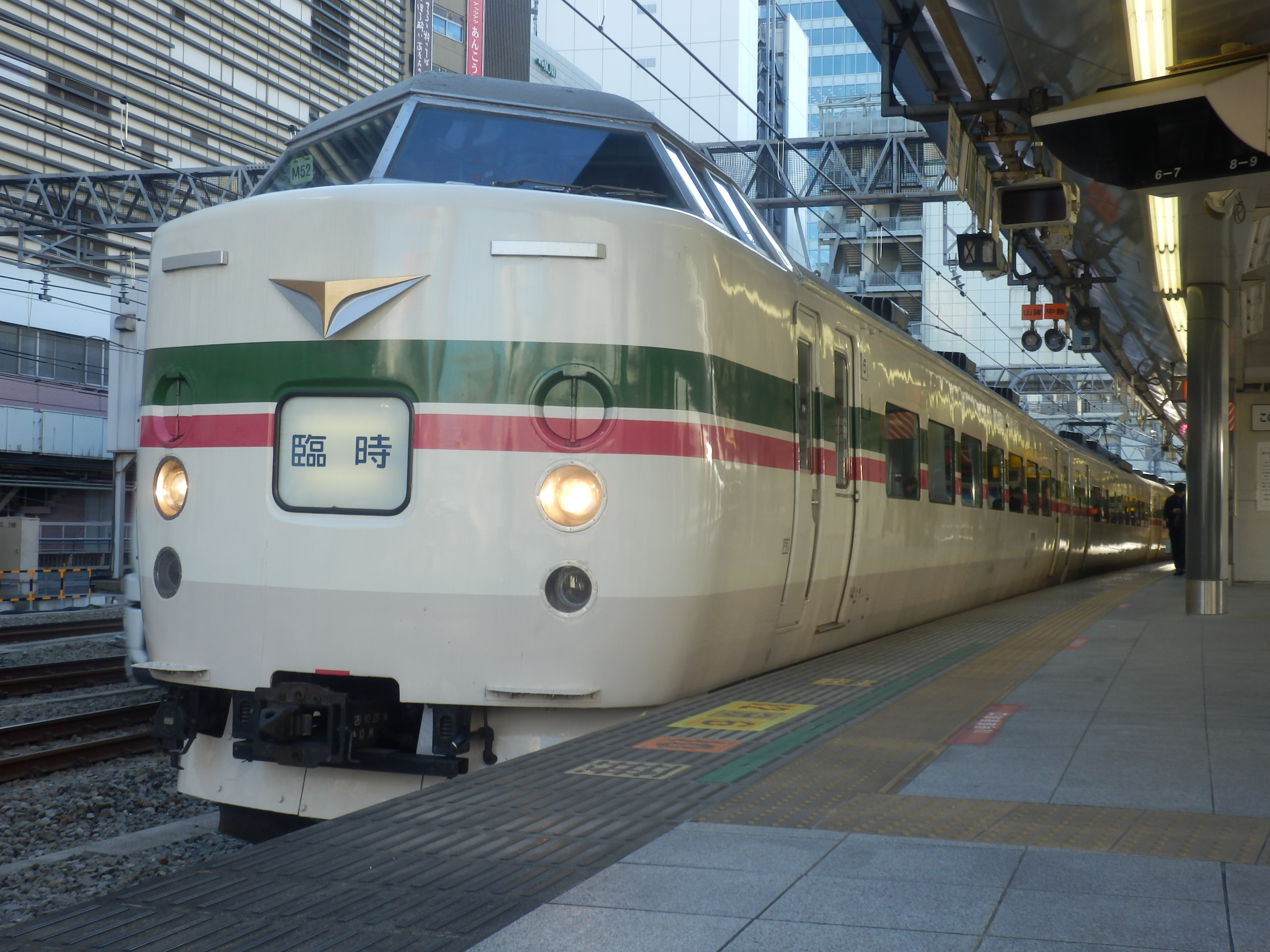 JR東日本 189系 M52編成 新宿駅 快速富士山